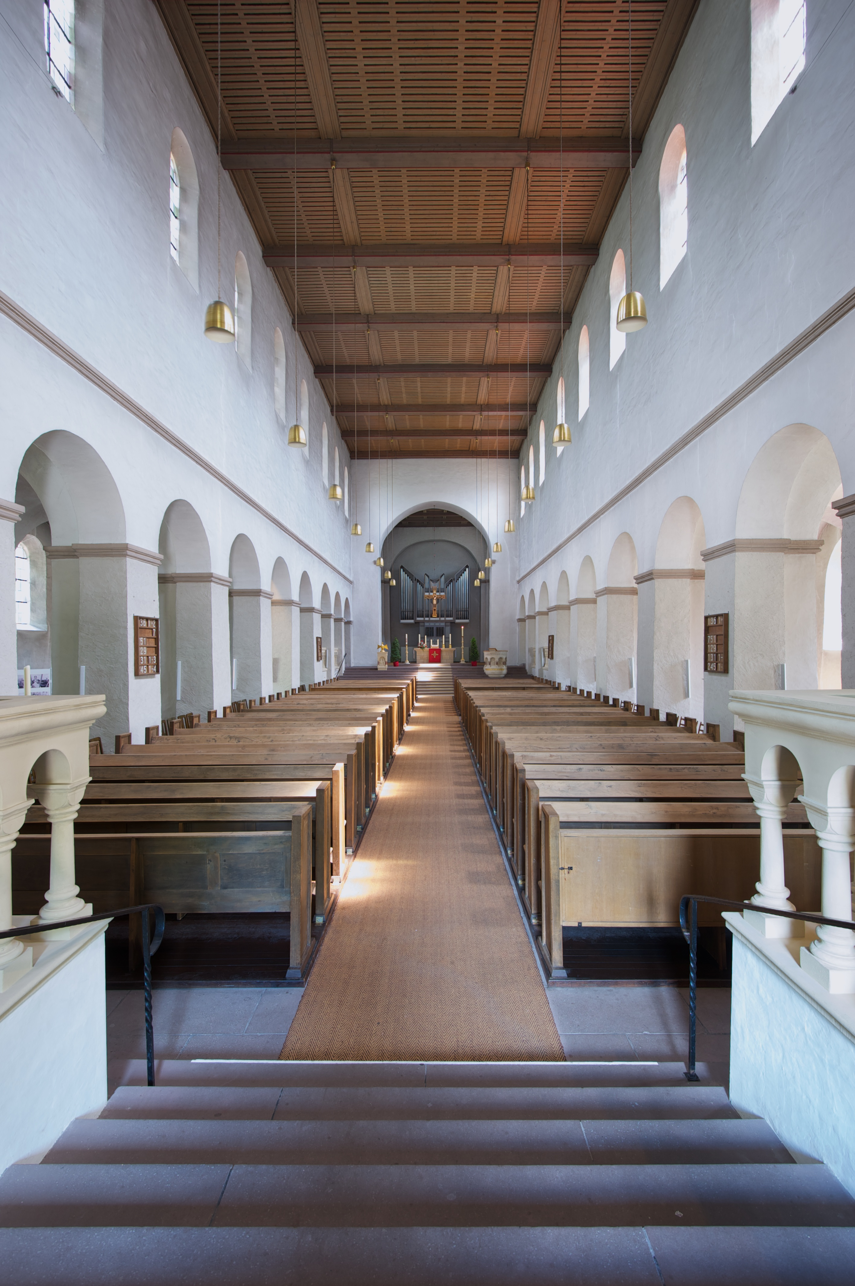 Innenansicht (Mittelschiff) der Abdinghofkirche in Paderborn